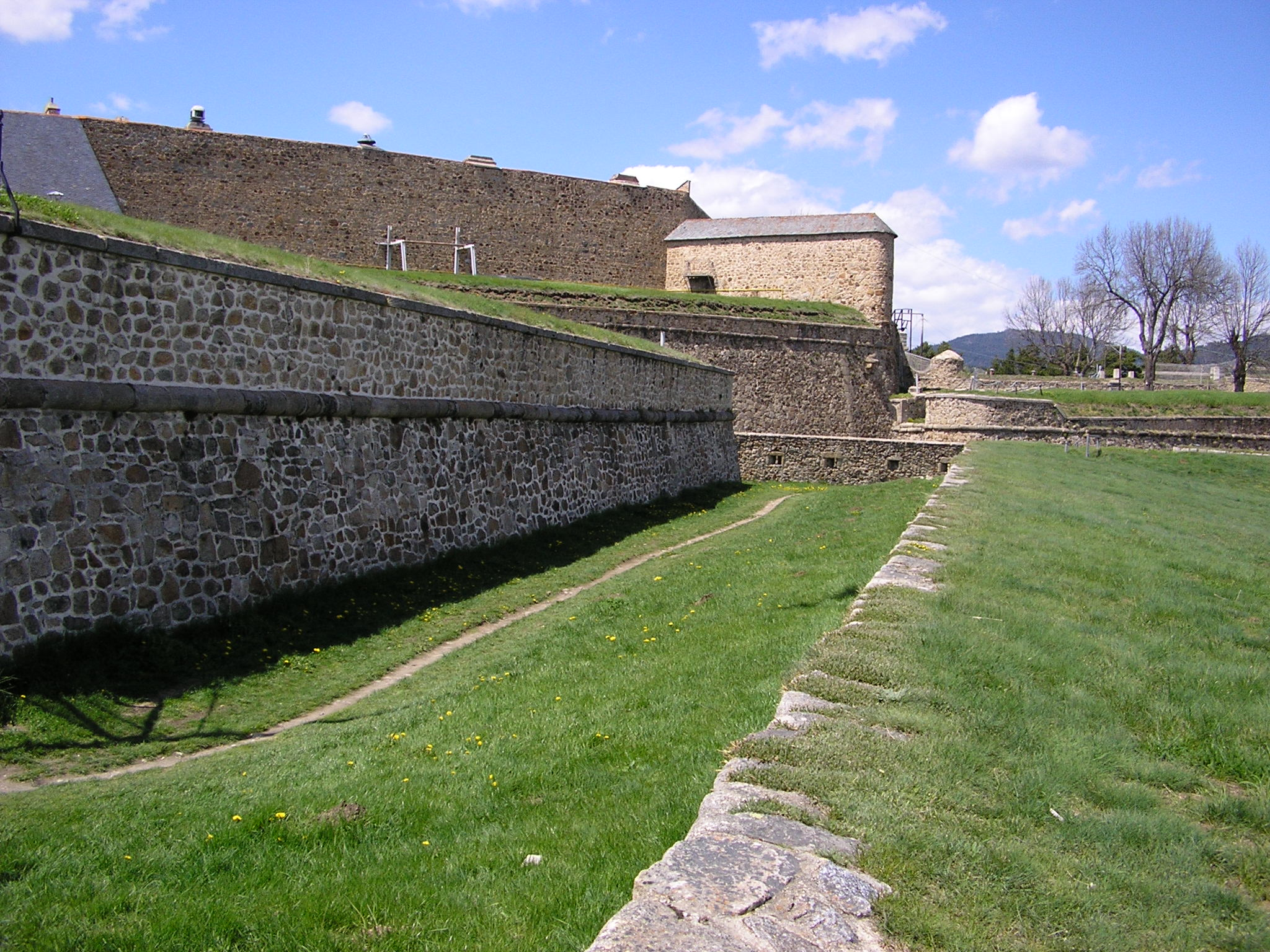 Vista parcial de la ciutadella de Montlluís.